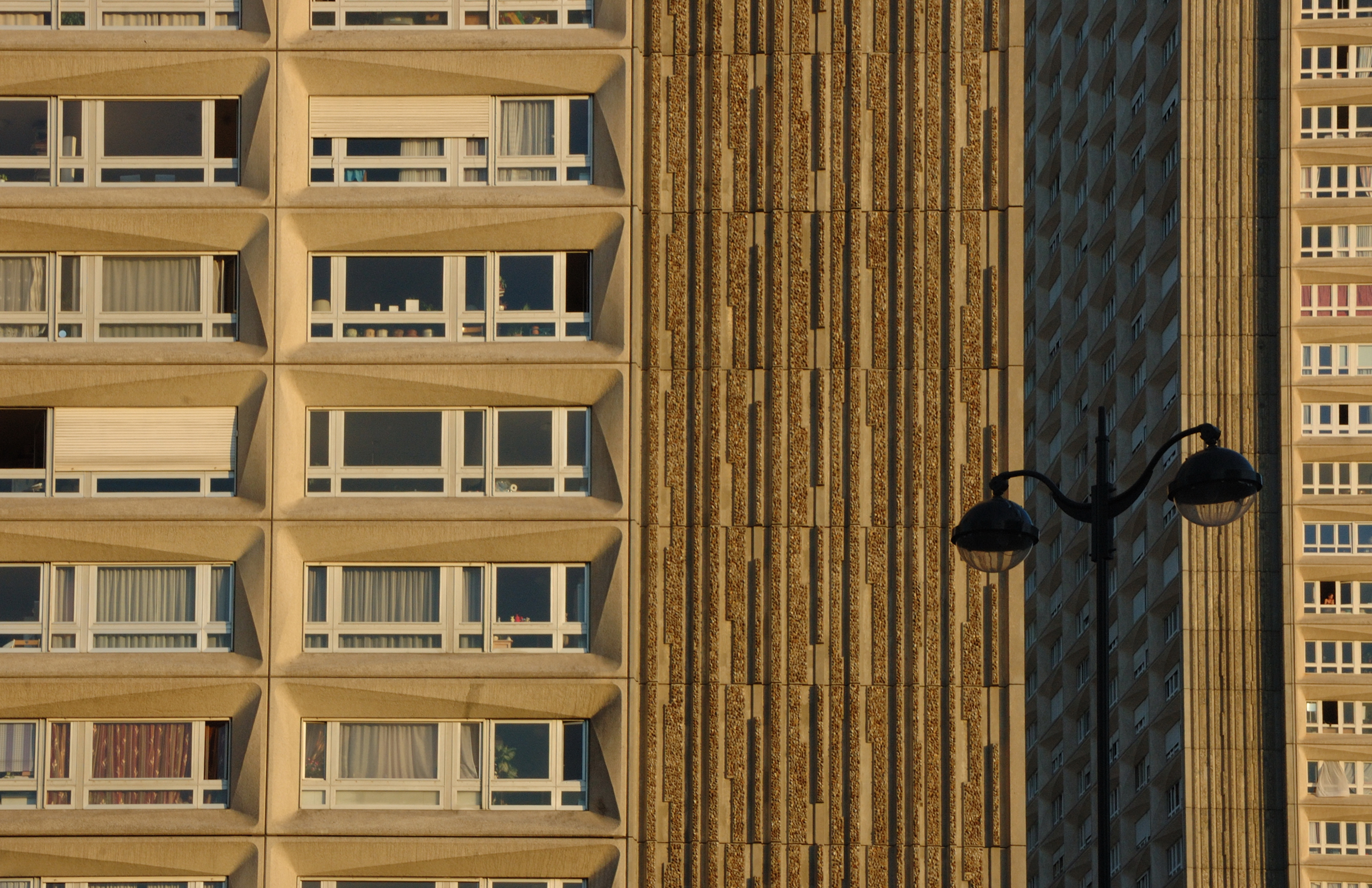 Détail des tours d'habitation de Tolbiac à Paris.